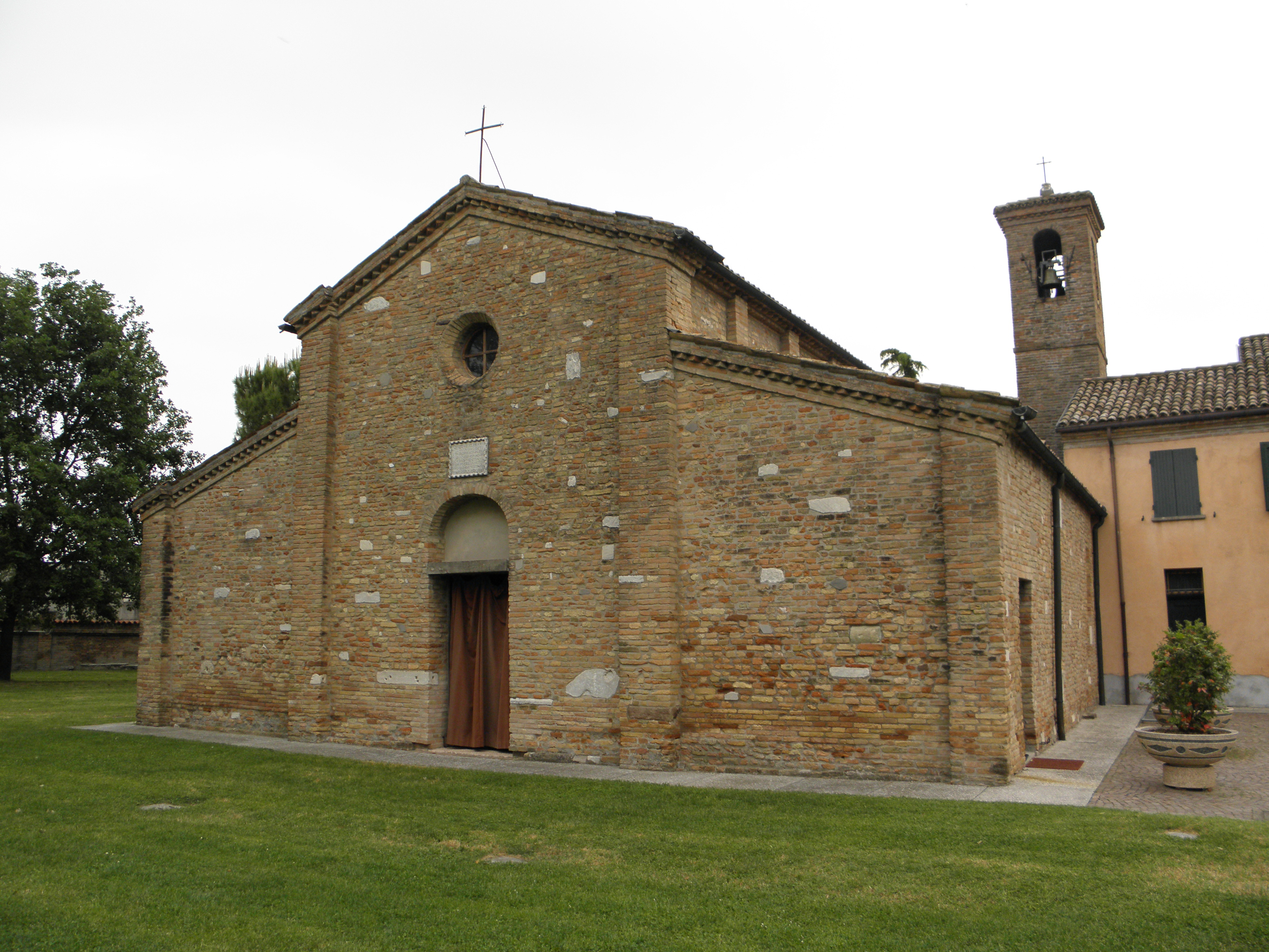 Pisignano, frazione di Cervia: la romanica pieve di Santo Stefano.